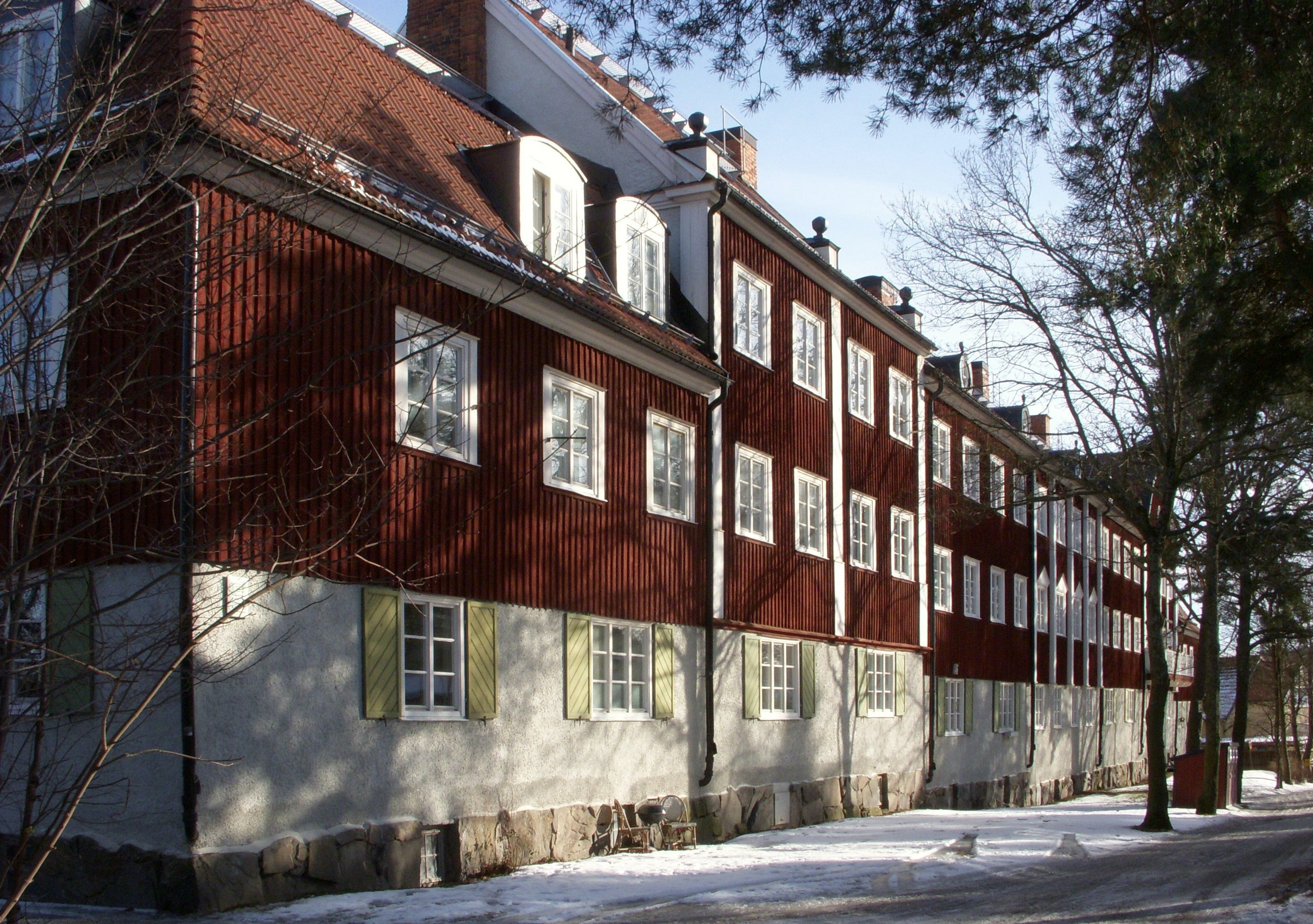 Bostadshuset i kvarteret Bergsryggen vid Ulvsundavägen